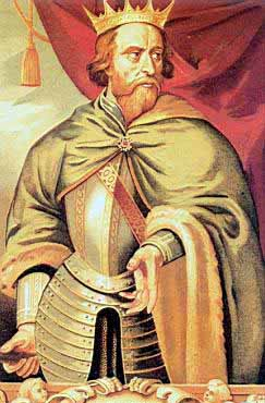 Representación del Rey Pedro III de Aragón durante la Cruzada contra su Corona, dicha Cruzada hecha por el Papa Martín IV.